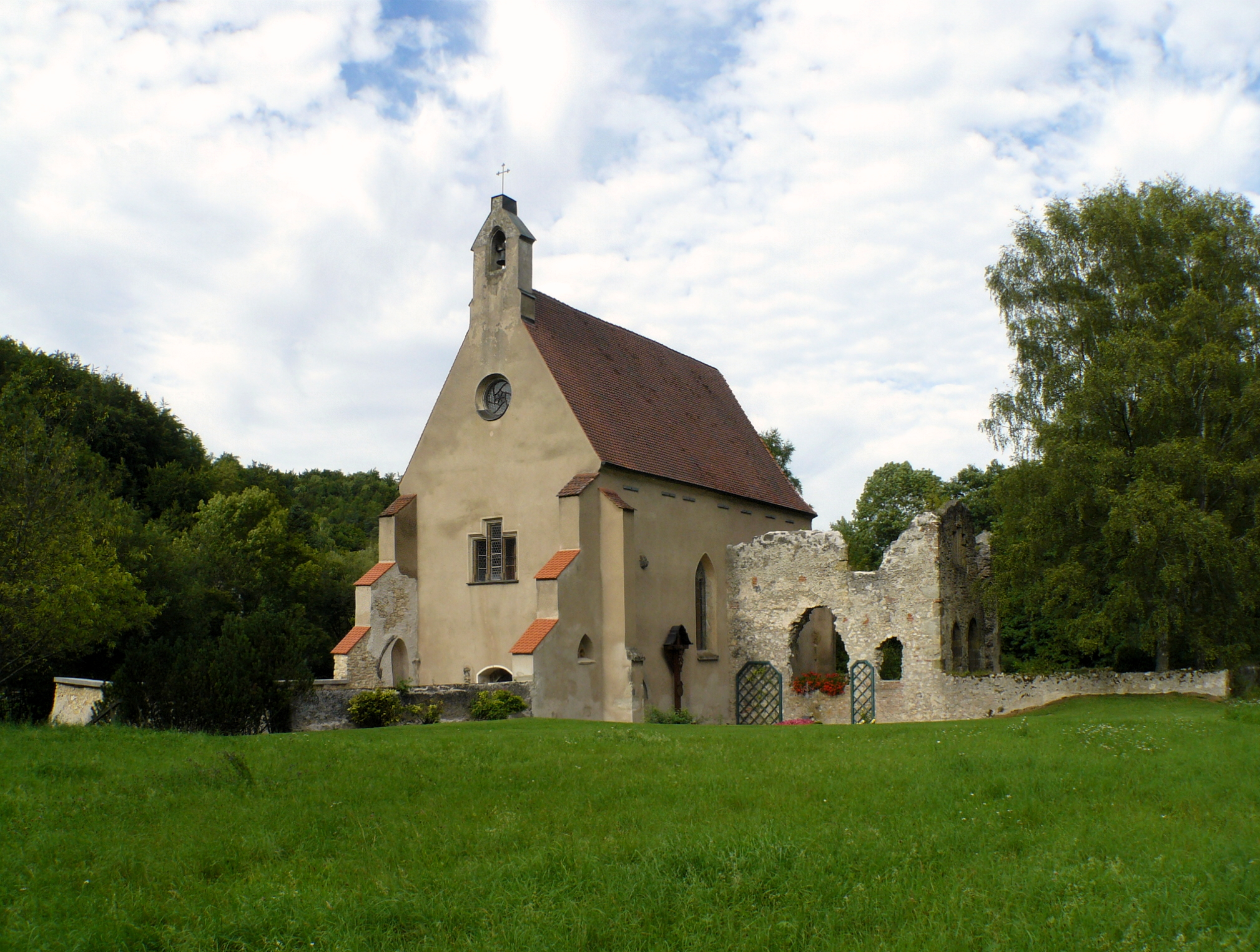 Kloster Christgarten